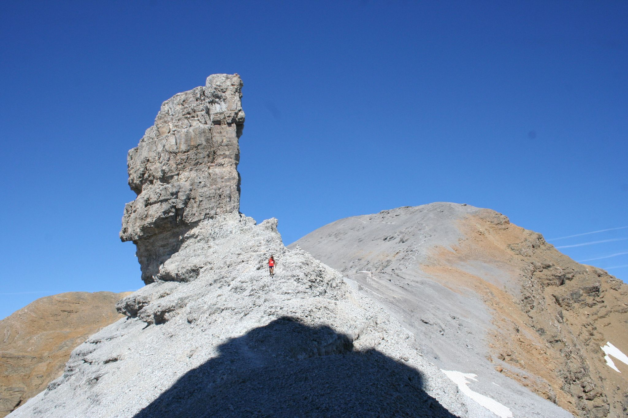 Doigt de la Fausse Brèche et pic du Taillon (3144m) en fond, ombre de la Pointe Bazillac. Vue prise depuis la Fausse Brèche.